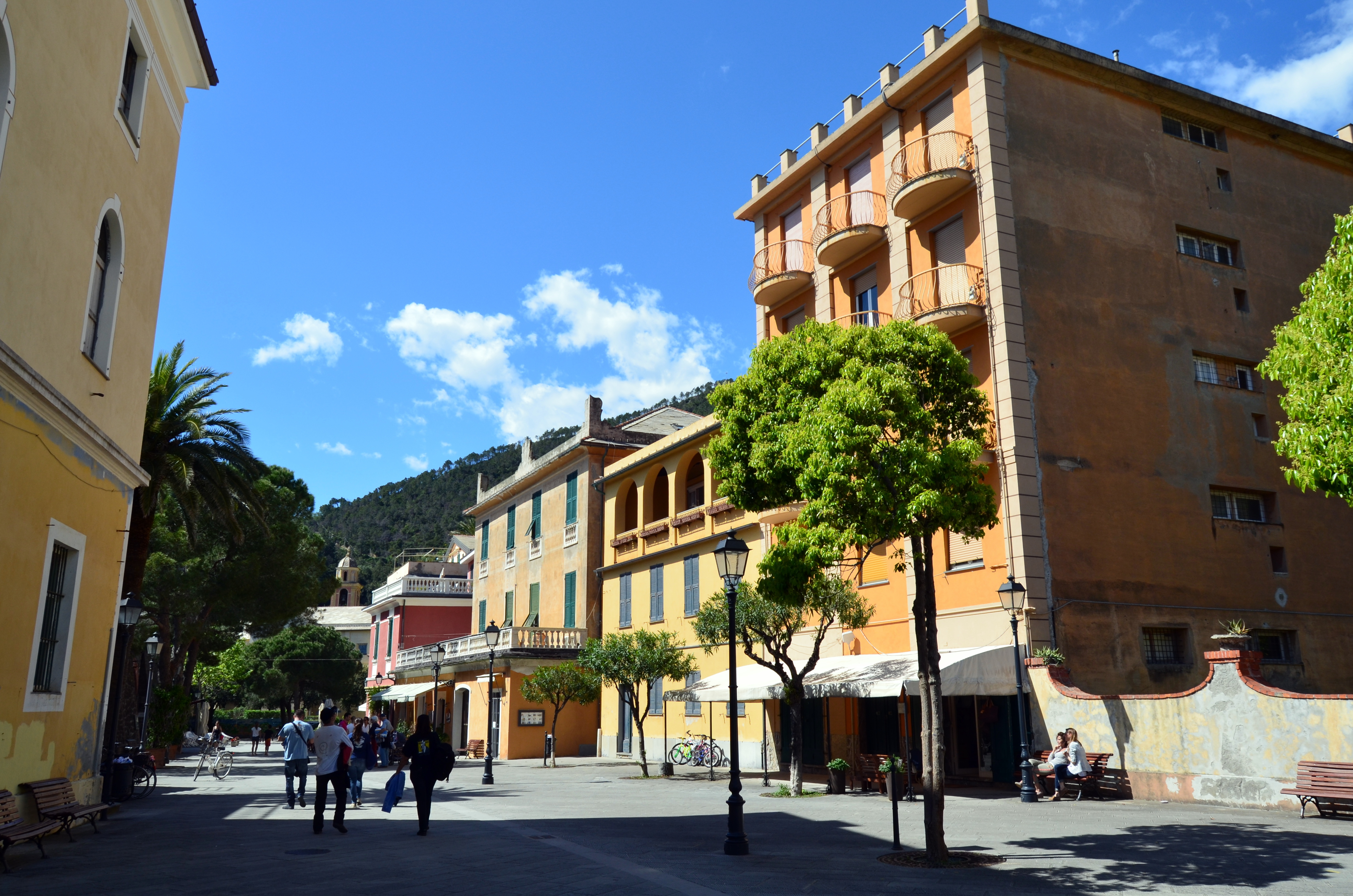 Via Fratelli Rezzano, Bonassola, Liguria, Italia